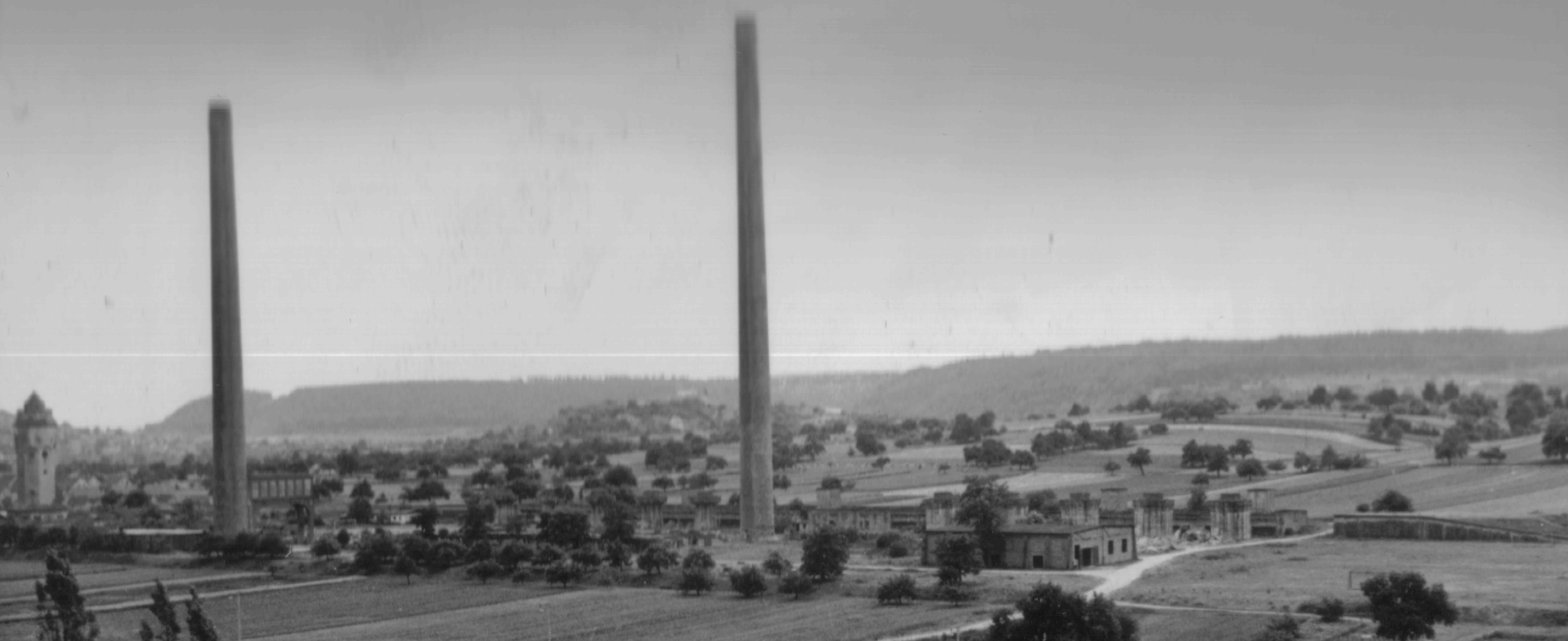 Am linken Bildrand der zum Werk gehörende Wasserturm, im Vordergrund die beiden Schlote der linke mit Fuchs, rechts davon eine Lagerhalle die sich heute noch innerhalb des Fibrowerkes befindet, im Hintergrund die Reste der Hochöfensockel sowie die Bahnrampe die unter den Hochöfen durch führte. Bild wurde am 14.Juni 1962 unmittelbar vor der Sprengung der Schlote aufgenommen.